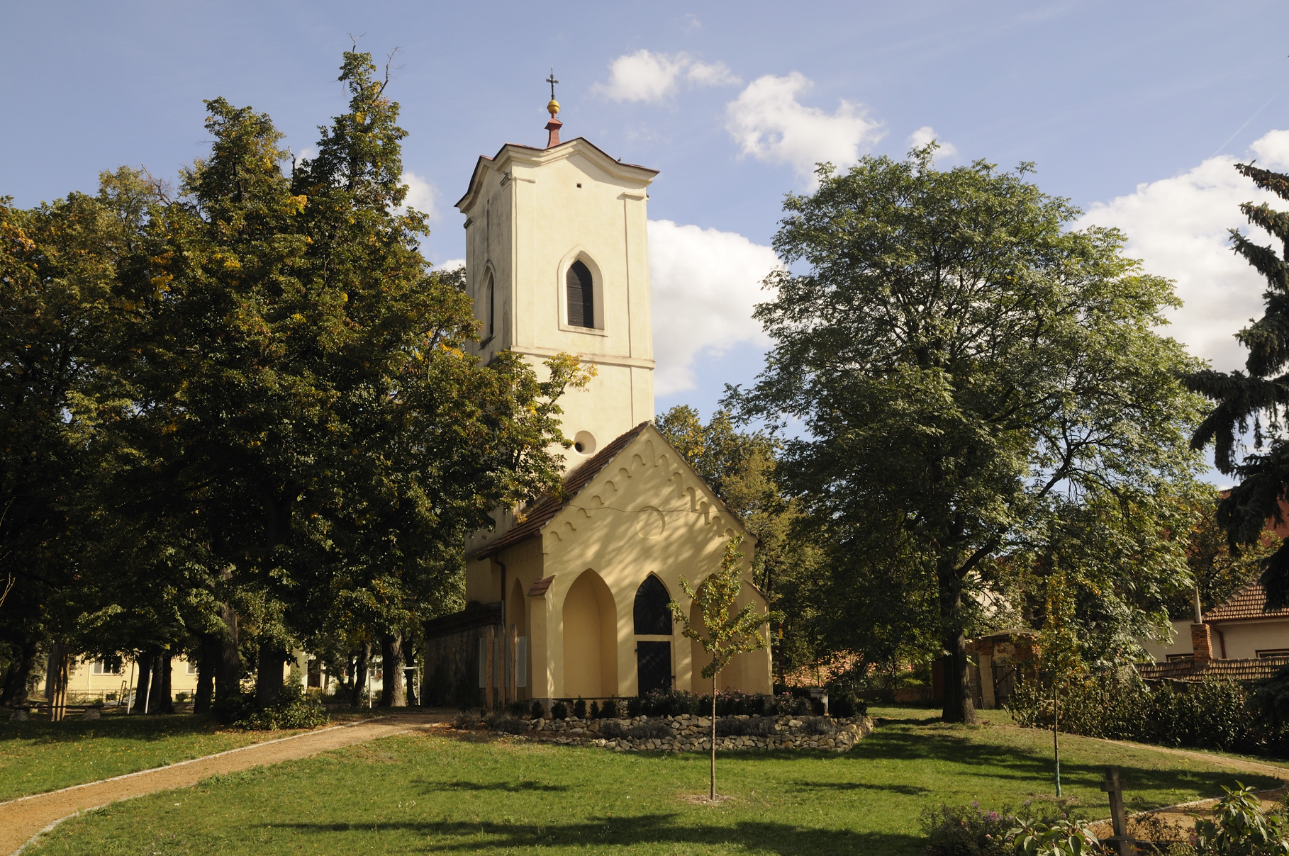 Zvonice (Židlochovice), Legionářská, Židlochovice